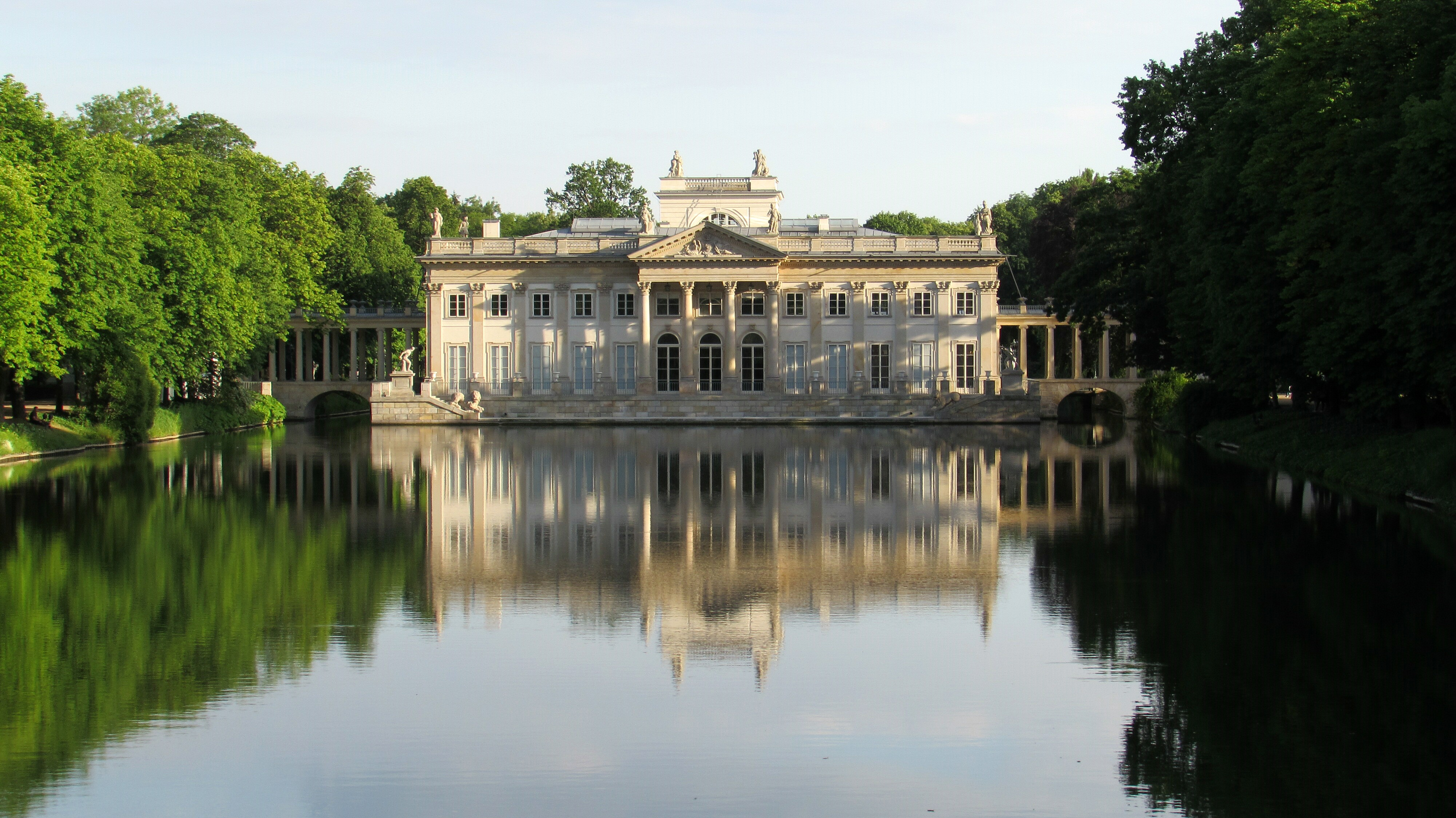 Warschau Lazienki Palast